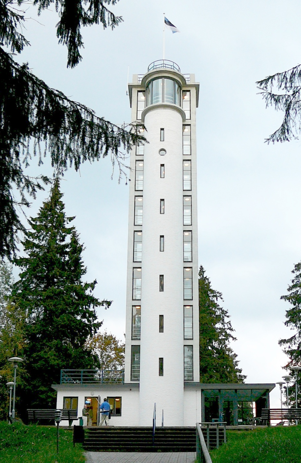 The view tower of Suur Munamägi of South-Estonia